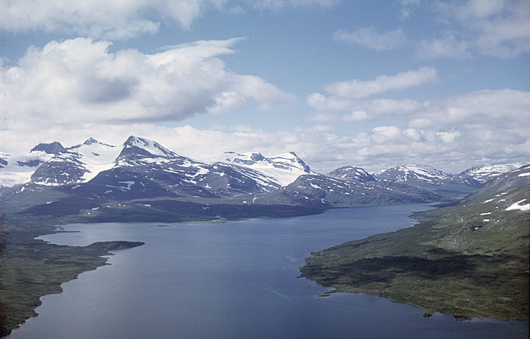 Motiv: Gräsvattnet Nyckelord: Flygbilder Kategori: InsjömiljöerGräsvattnet